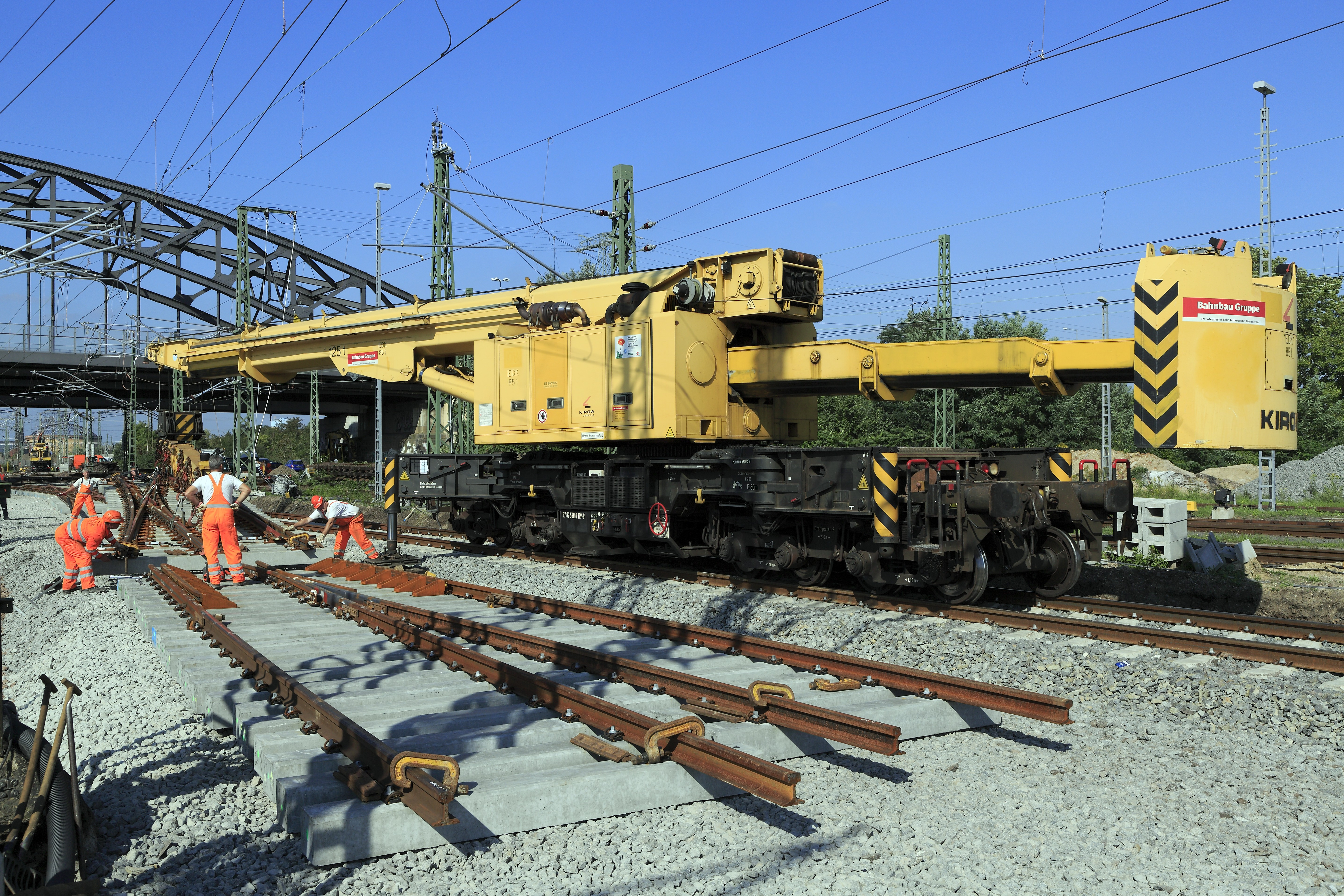 DKW 54-190-1:9, das Mittelteil mit Zungenvorrichtungen und Doppelherzstücken wurde vom Weichenwerk vormontiert geliefert und wird mittels Traverse in einem Stück eingebaut. Die Gegenmasse des EDK ist für einen möglichst vollständigen Masseausgleich längsverschiebbar.